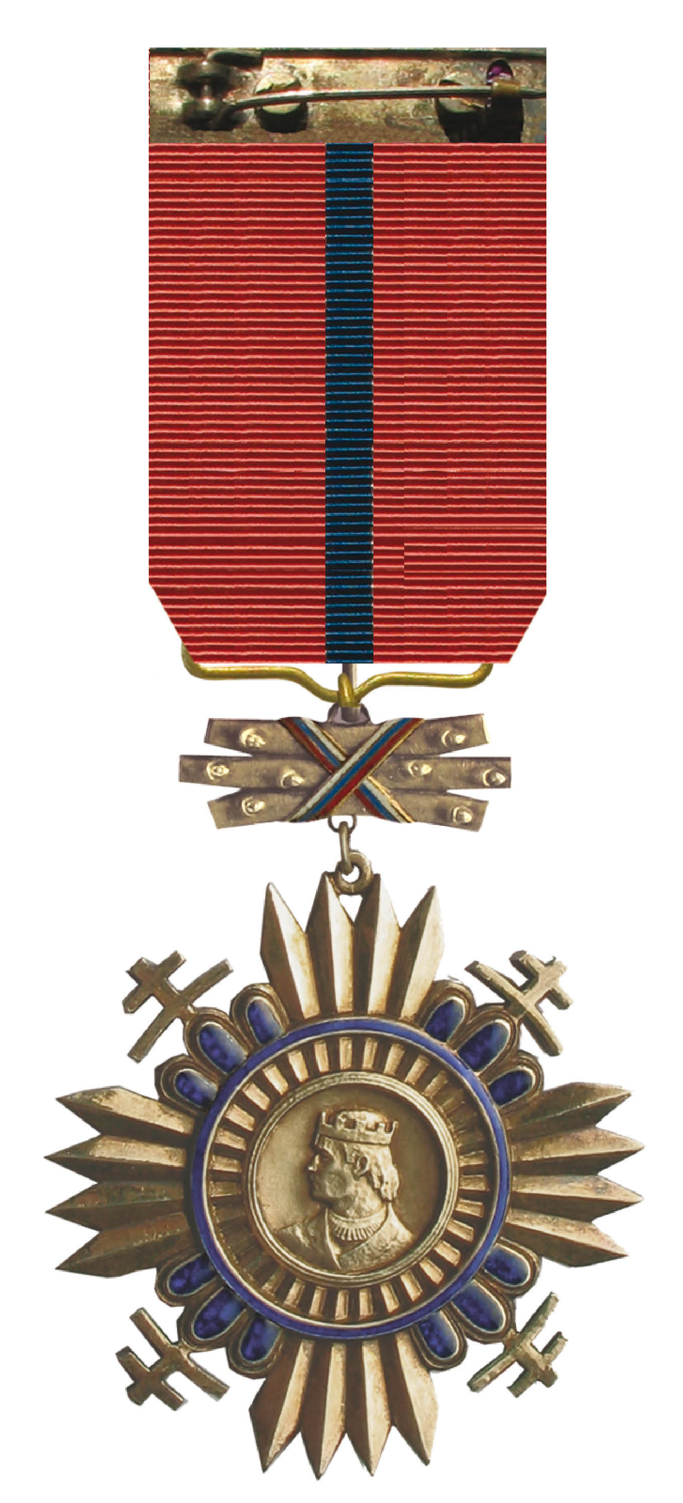 Dôstojnícky kríž Radu knižaťa Pribinu 4. triedy vojnovej Slovenskej republiky 1940-45. Jeho autorom je Ladislav Majerský